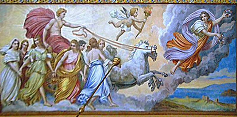 Josef Reiner, Aurora, 1898